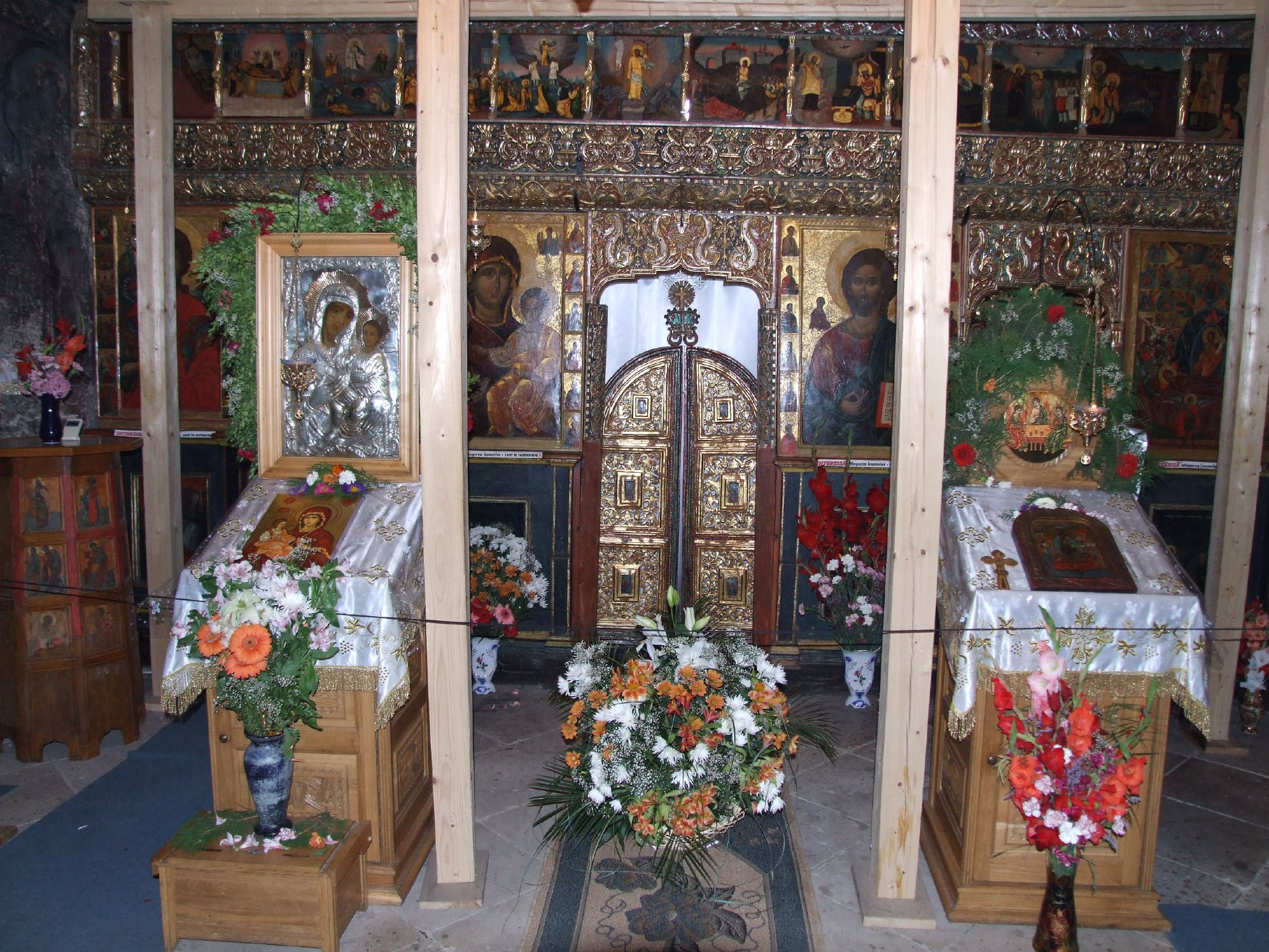 Manastirea Humor